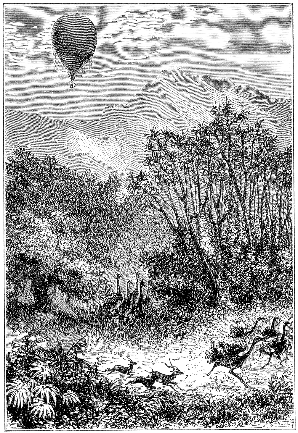 Jules Verne : Cinq Semaines en ballon, Hetzel & Cie, Paris, 1863.